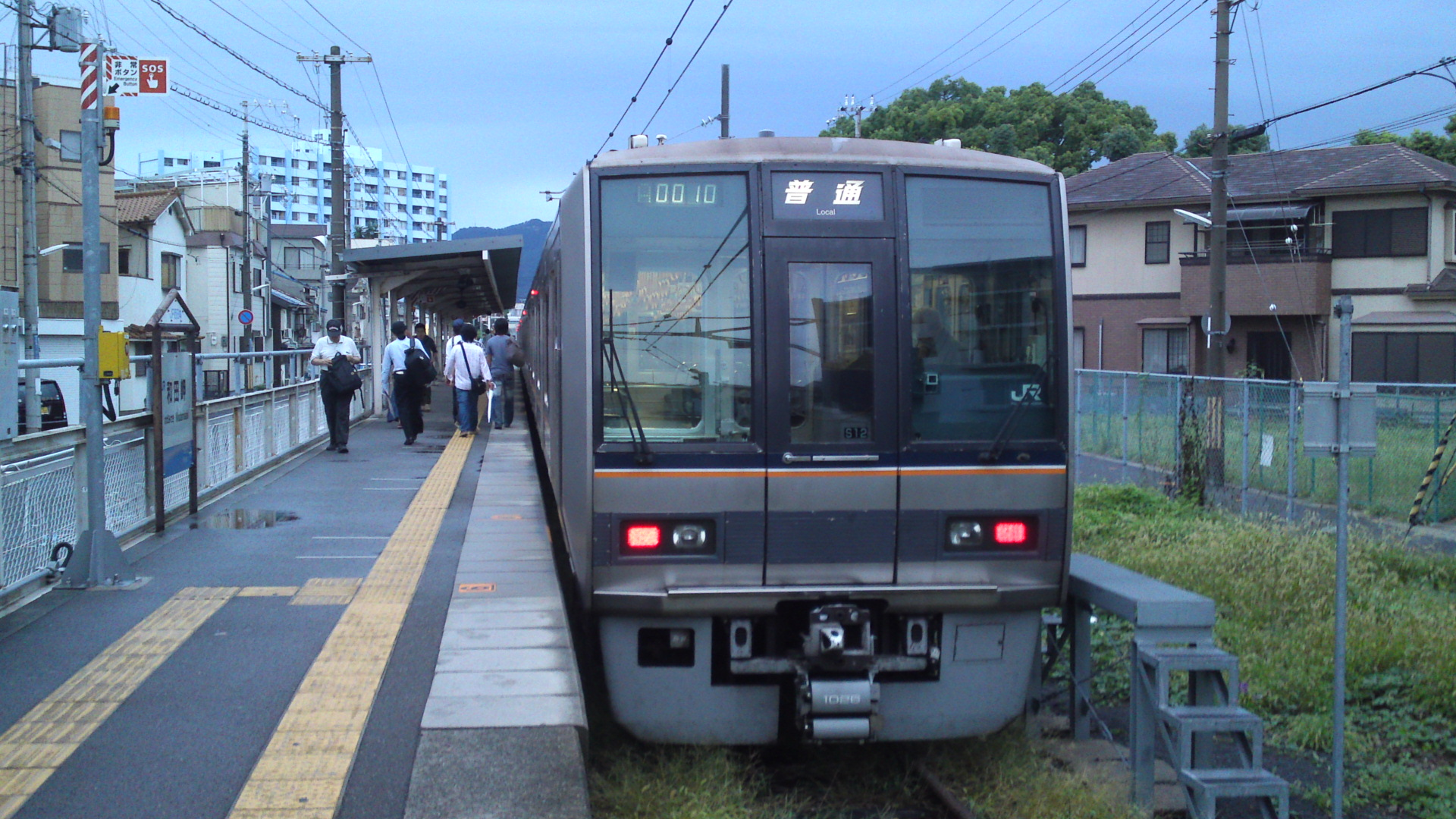 103系電車の代走に当たる207系電車（和田岬駅）